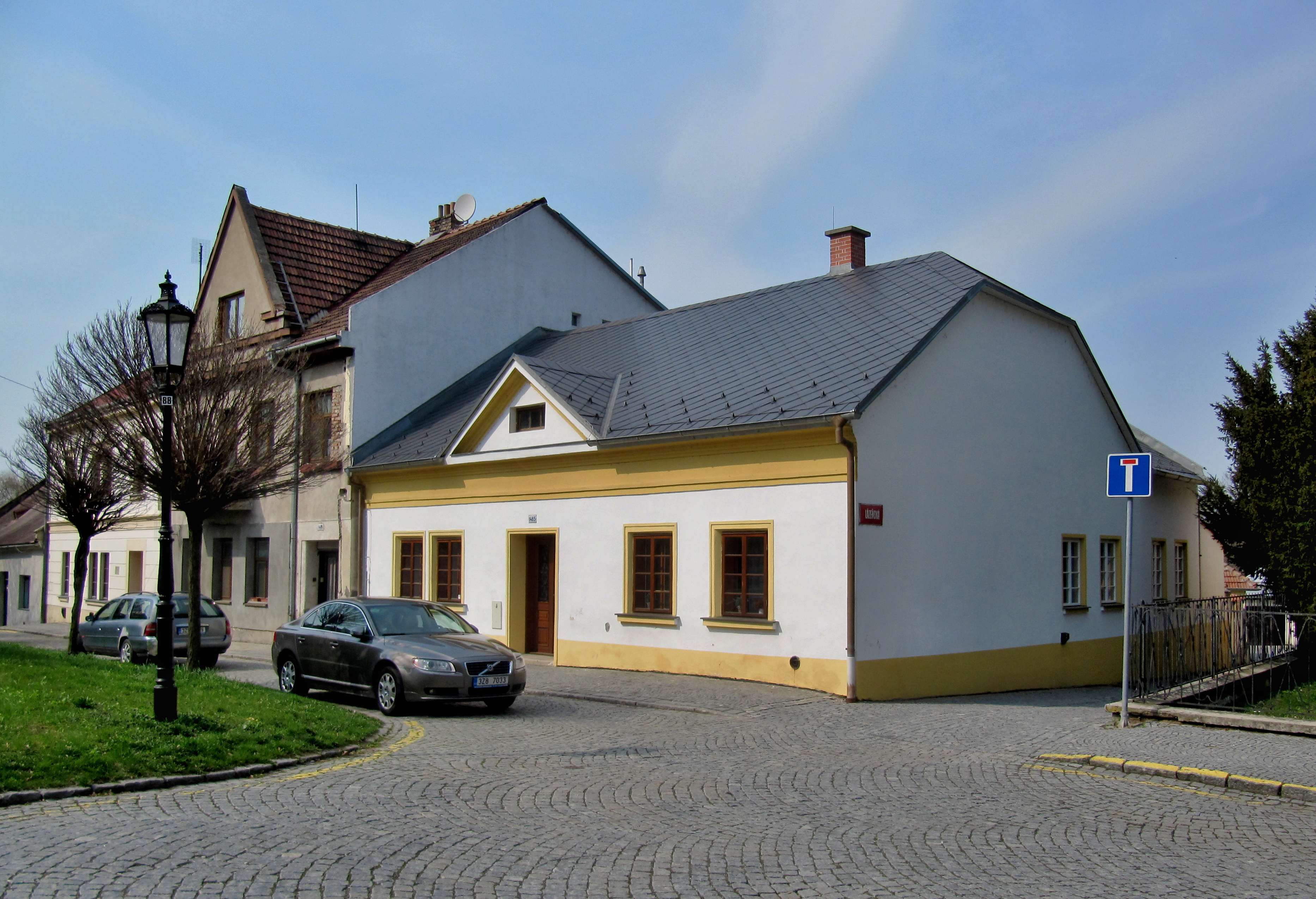 Kroměříž, Na Kopečku 6